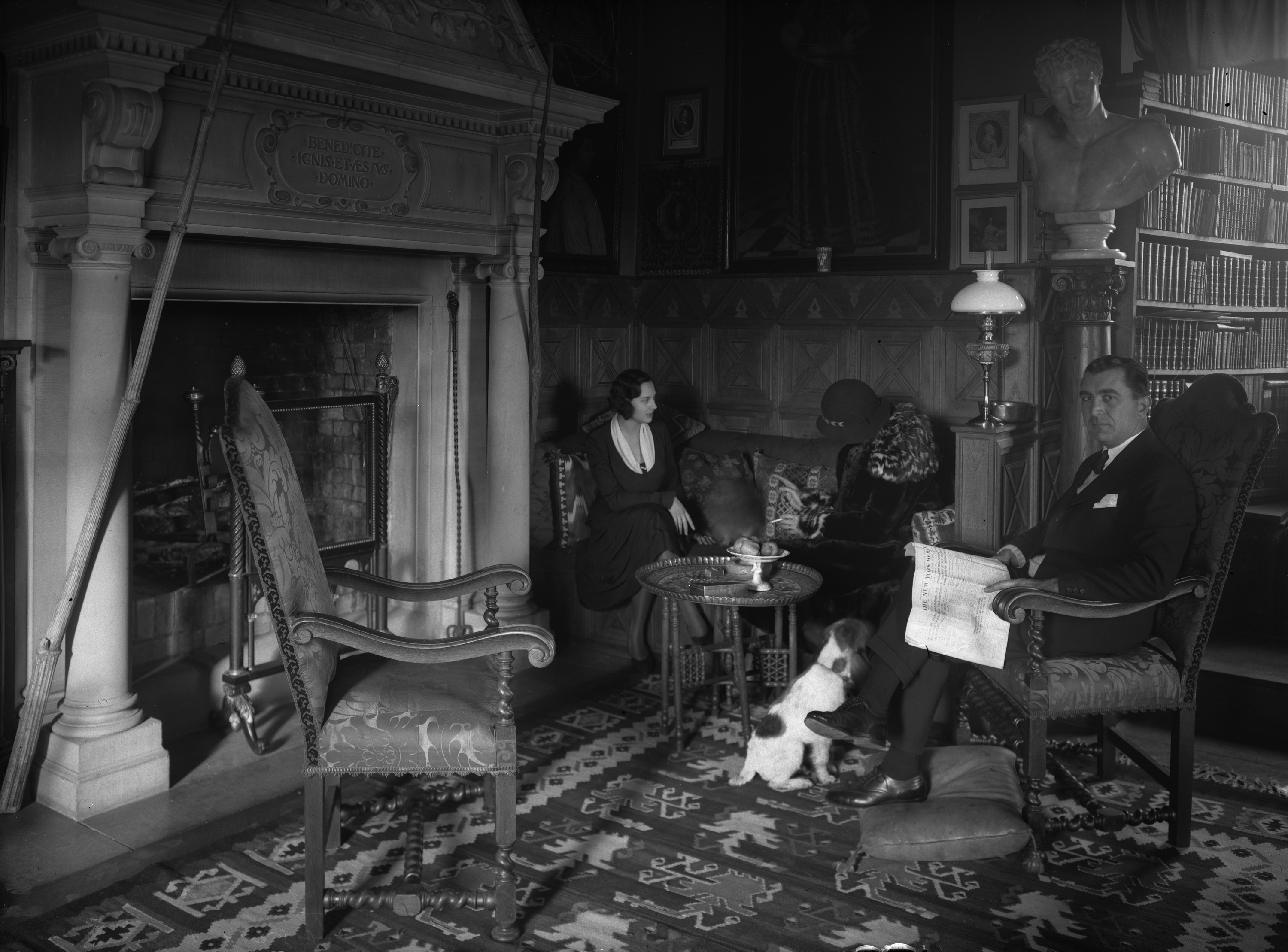 Tyresö slott, interiör från biblioteket. Sittande i stol markis Claes Leo Lagergren. T v i soffan grevinnan Nadescha Lagergren, gift med greve Johan Lagergren. T h i soffan grevinnan Ellen Lagergren, gift med greve Carl Lagergren.